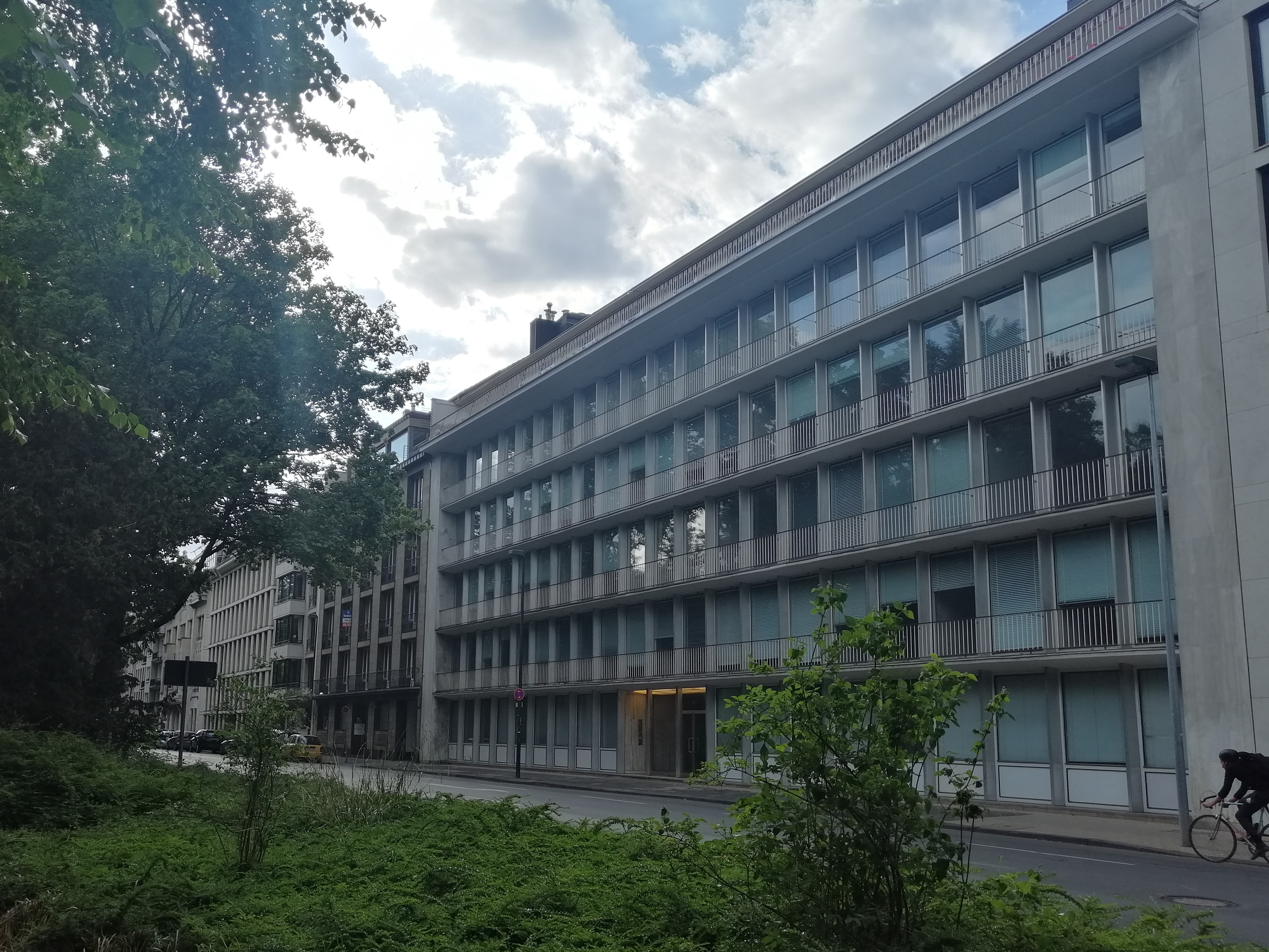 Aluminiumhaus, Jägerhofstr. 29 (Düsseldorf)